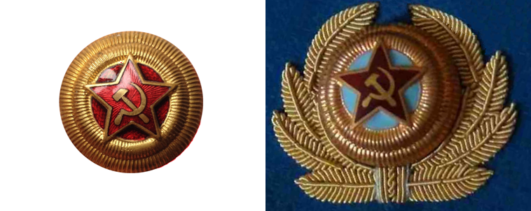 кокарда генералов